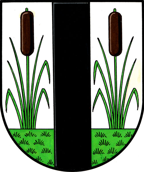 Znak města Šenova u Ostravy.